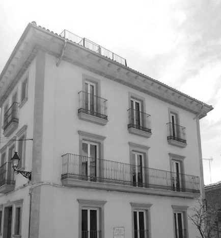 Casa de les joies situada al carrer de les joies Nº 33 al costat de l'Ajuntament.